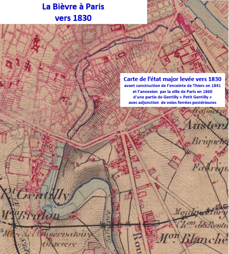 Bièvre vers 1850